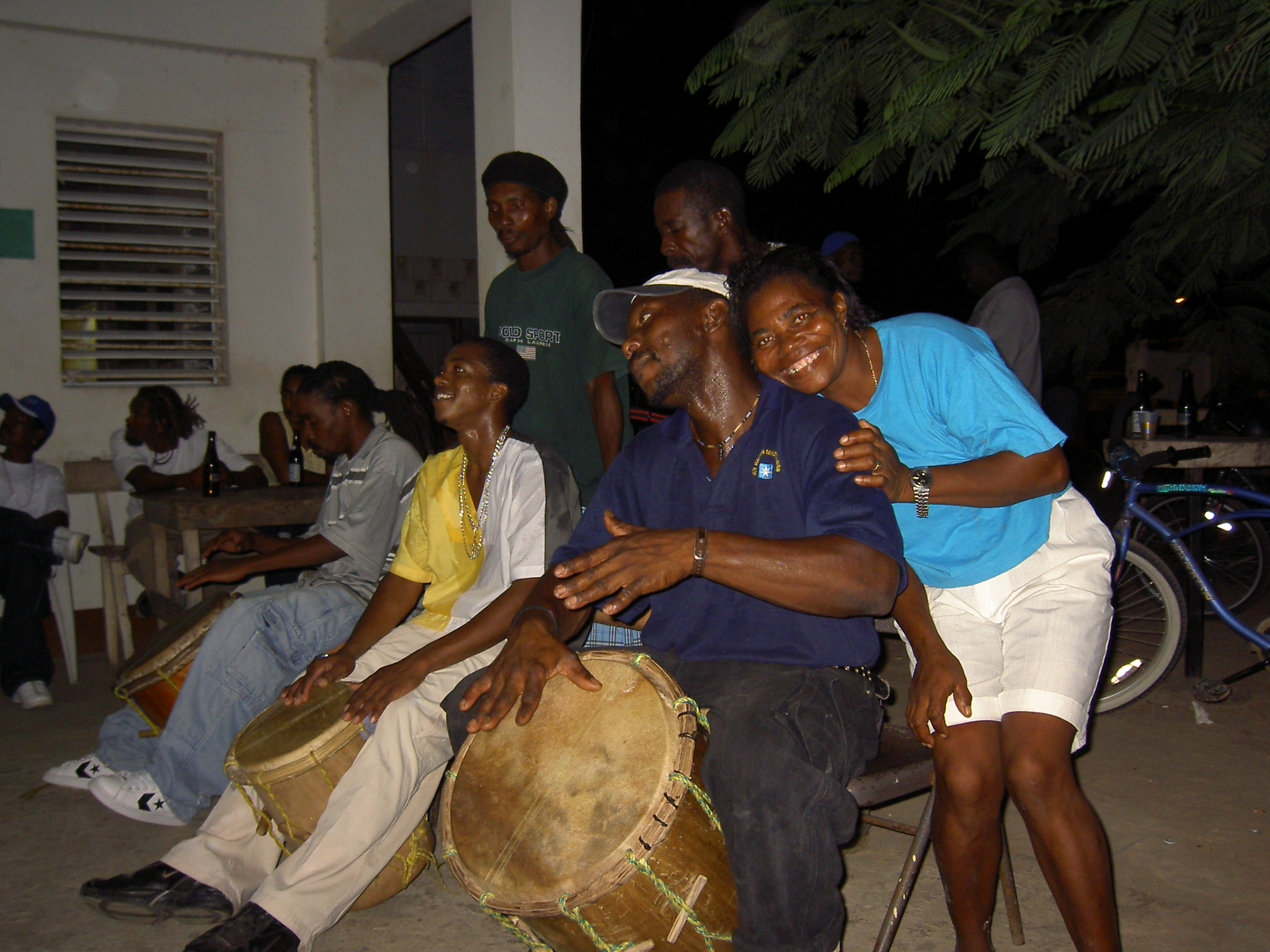 Viajes 2004